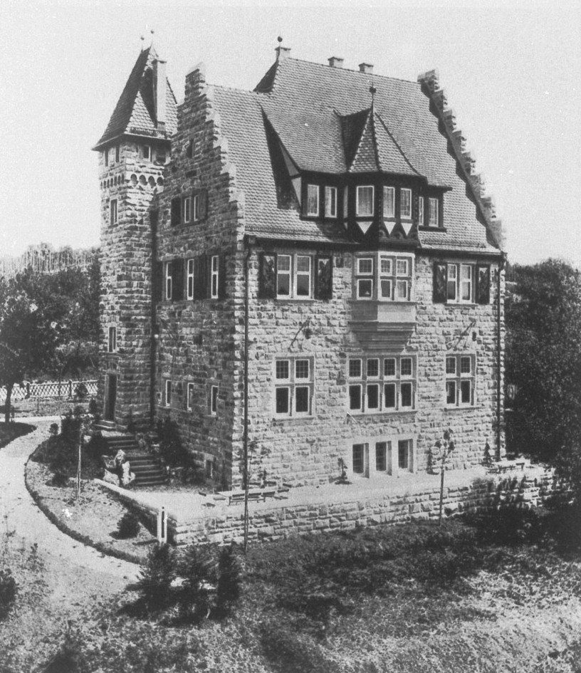 Haus der Landsmannschaft Schottland Tübingen ohne Erweiterungsbau